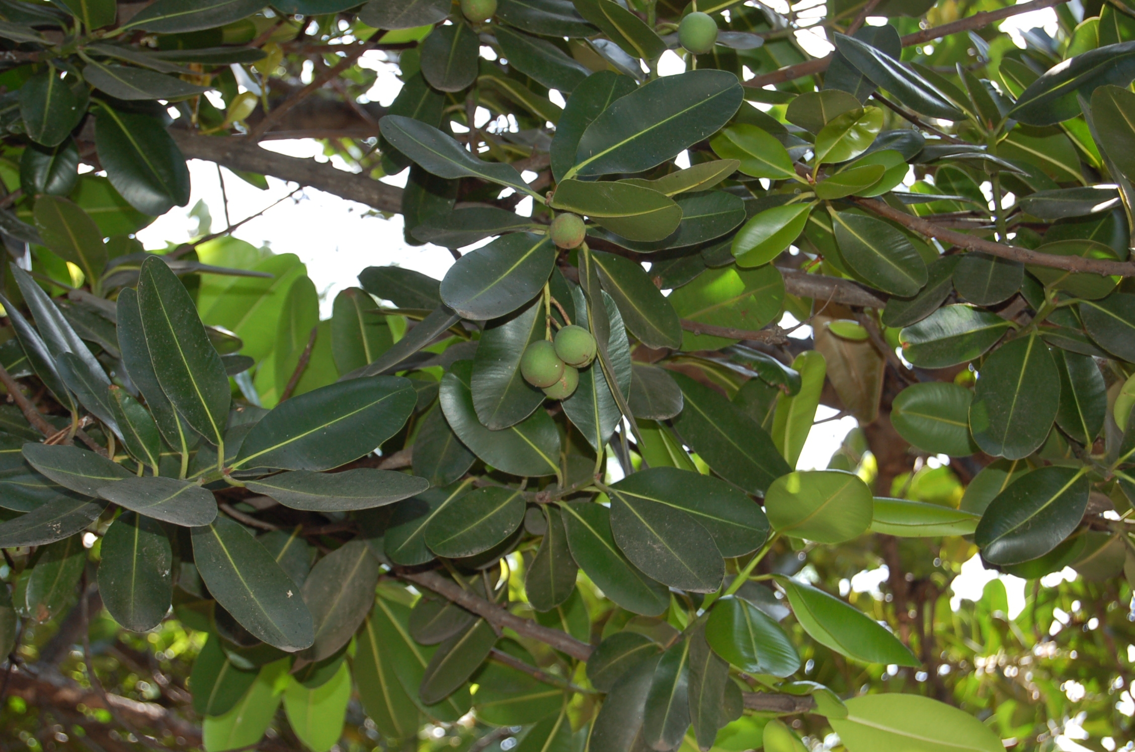 ஒளிப்படம் எடுத்தவர்: செ.இரா. செல்வக்குமார். மயிலாப்பூர், சென்னை, தமிழ்நாடு, இந்தியா. மரத்தின் பெயர் புன்னை. செடியினப் பெயர் காலோவை'லம் இனோவை'லம் (calophyllum inophyllum). Photographed by C.R. Selvakumar. Mylapore, Chennai, Tamil Nadu, India. Tree called Punnai in Tamil. Scientific name calophyllum inophyllum.